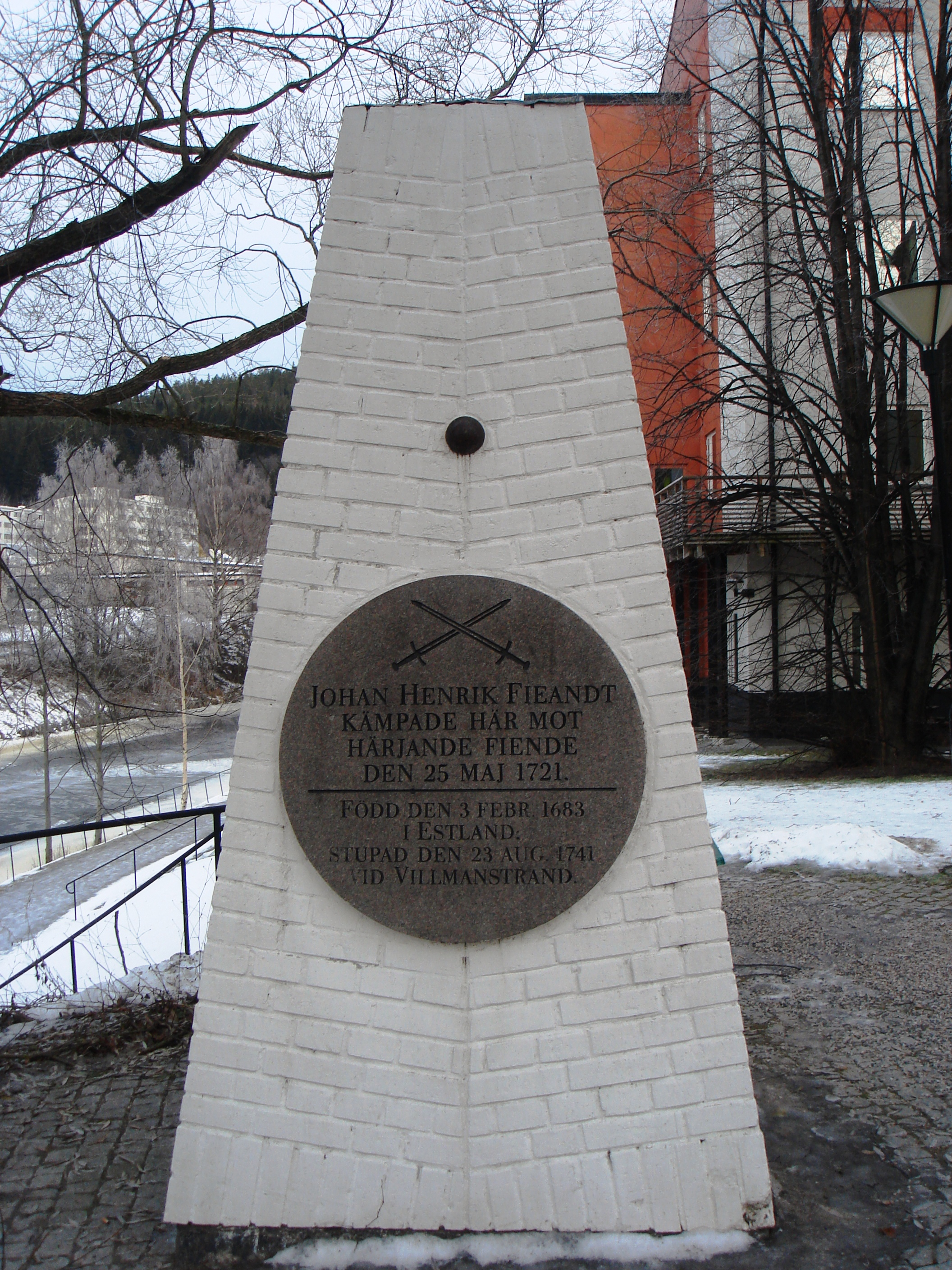 Johan Fieandt Memorial in Sundsvall, Sweden.